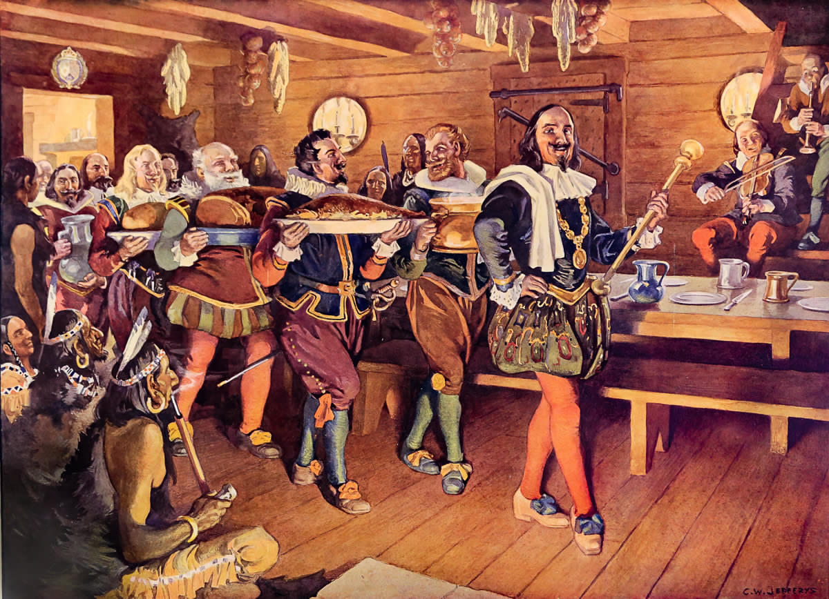 « Nous passâmes cet hiver fort joyeusement, & fîmes bonne chair, par le moyen de l'ordre de bon temps que j'y établis, qu'un chacun trouva utile pour la santé, & plus profitable que toutes sortes de médecines, dont on eut pu user. Cet ordre était une chaîne que nous mettions avec quelques petites cérémonies au col d'un de nos gens, lui donnant la charge pour ce jour d'aller chasser : le lendemain on la baillait à un autre, & ainsi consécutivement : tous lesquels s'efforçaient à l'envi à qui ferait le mieux & apporterait la plus belle chasse : Nous ne nous en trouvâmes pas mal, ni les Sauvages qui étaient avec nous. » Tiré des Voyages [...] de Champlain, 1613. MIKAN 3921846